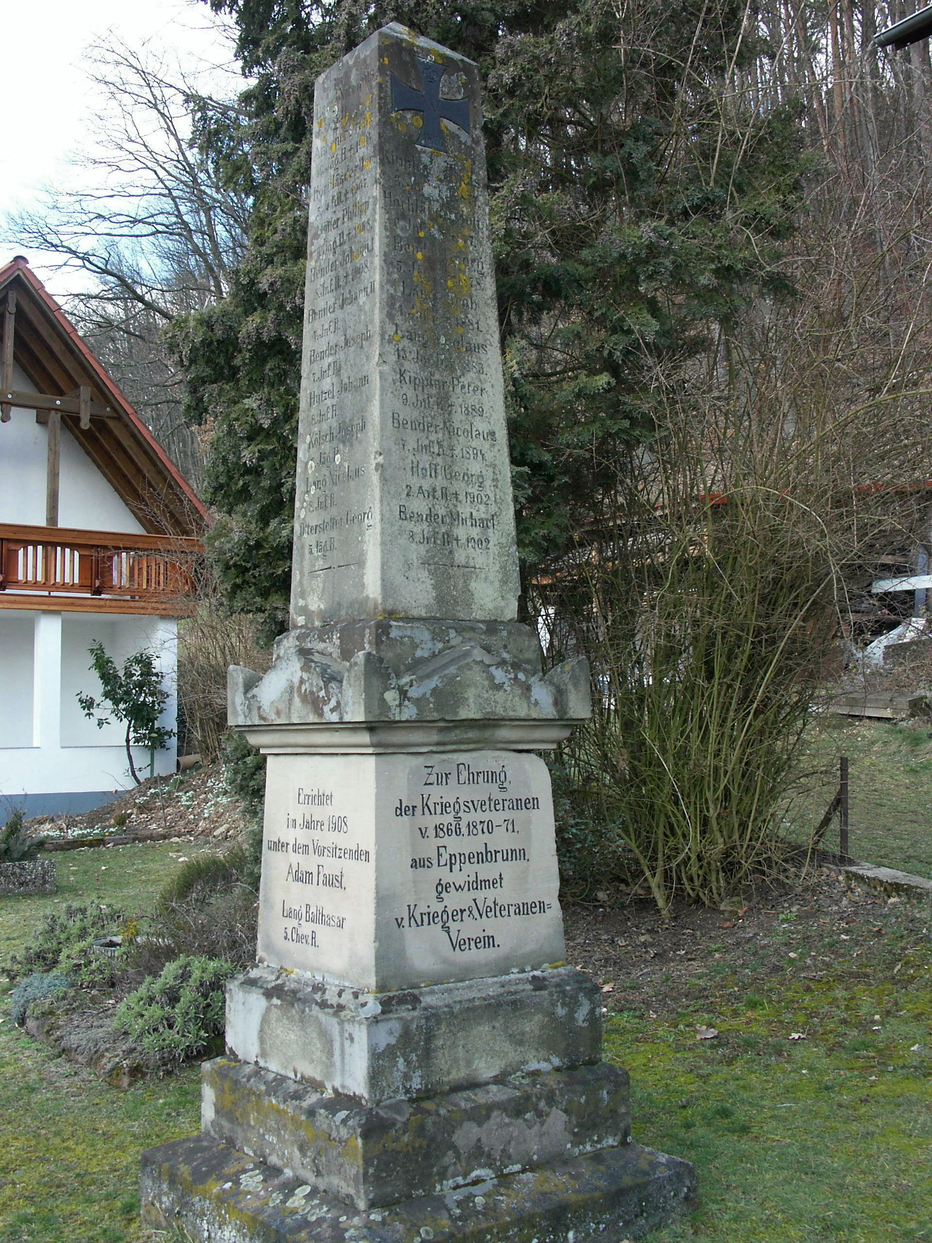 War Memorial - Krieger-/Kriegsopferdenkmal - Mémorial de guerre (1870/71)